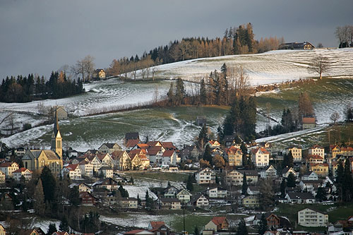 Rehetobel